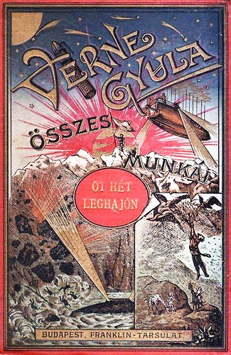 Jules Verne: Öt hét léghajón című - a Franklin Társulat által 1908-ban kiadott - regényének könyvborítója.